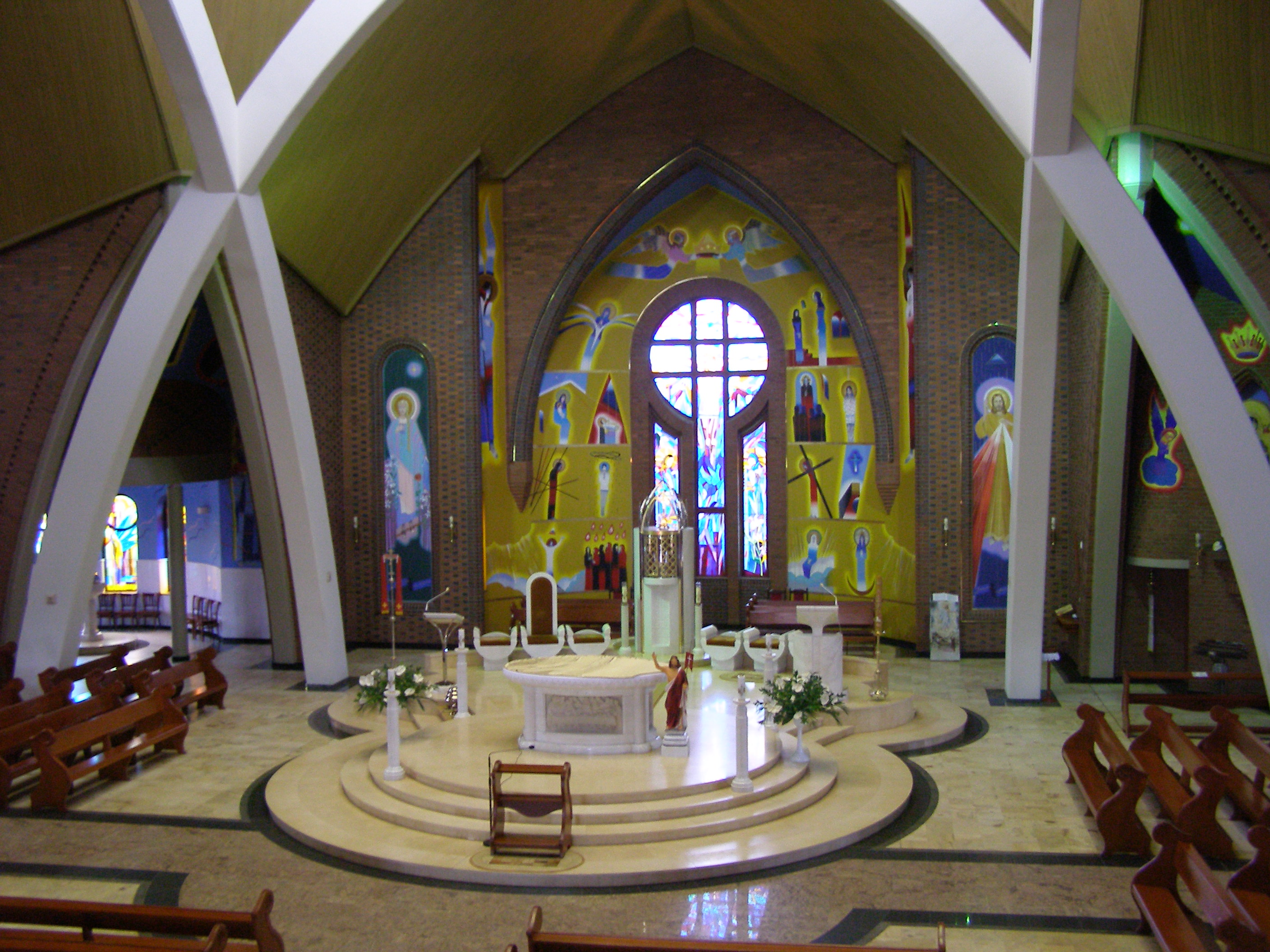 Kościół pw. błogosławionej Karoliny Kózkówny w Tychach.